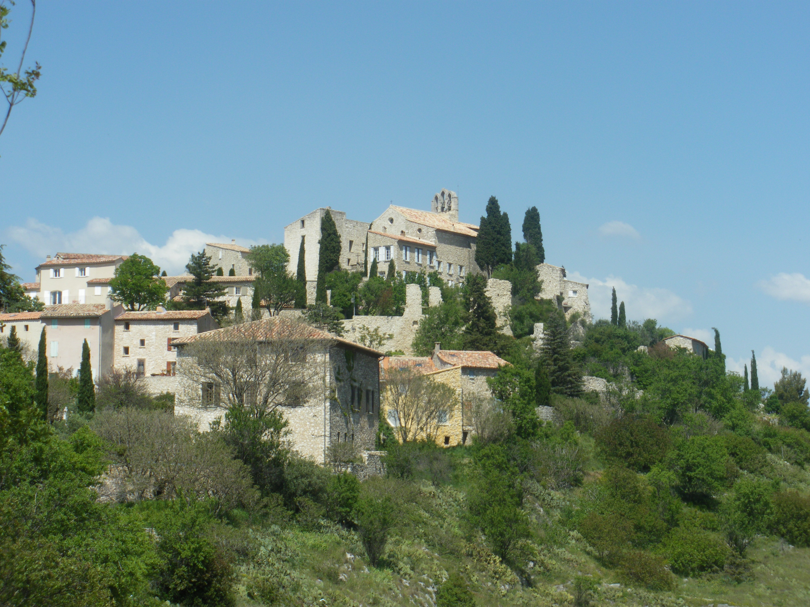 église de Méthamis, Vaucluse